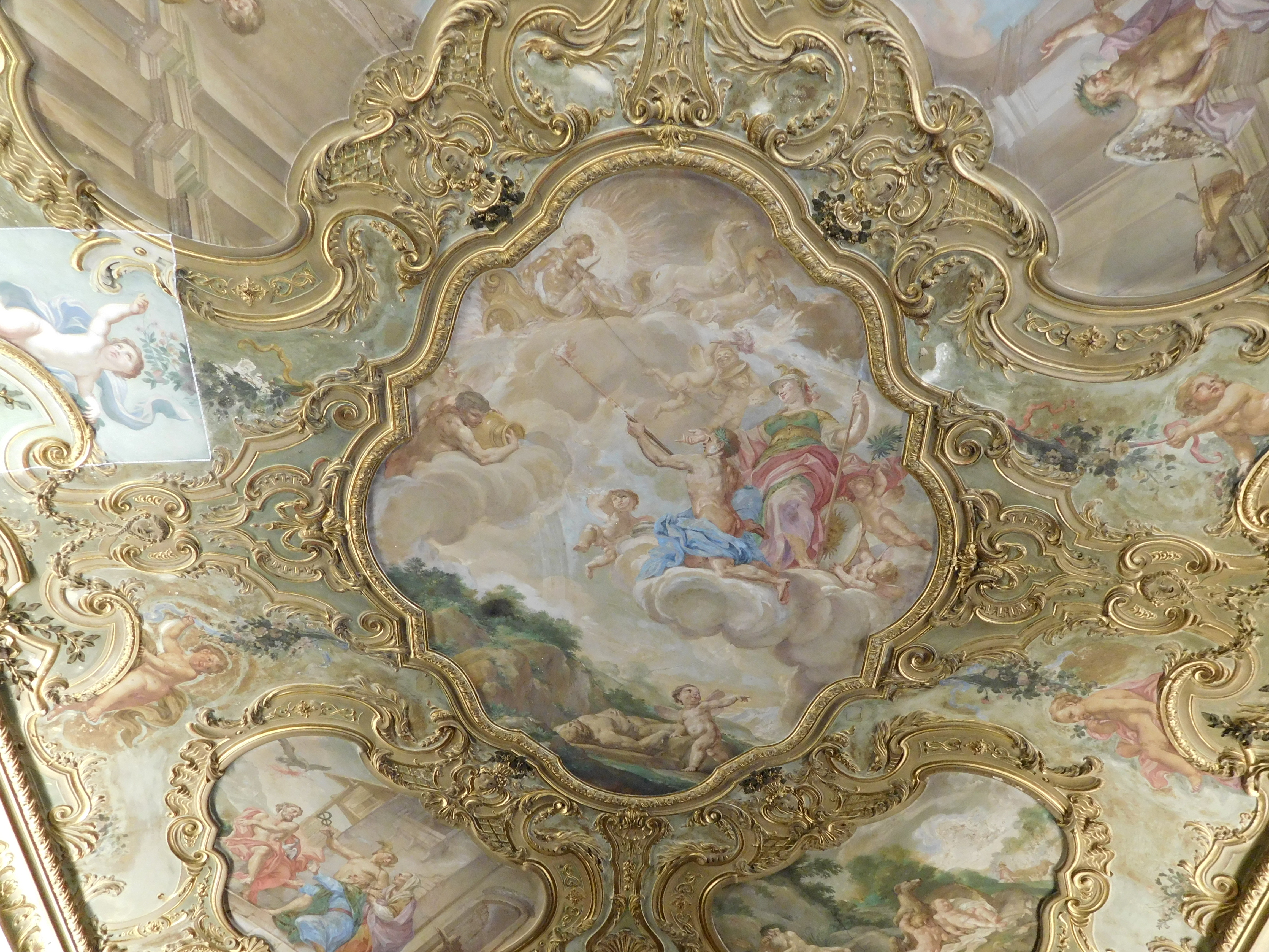 Palazzo Doria De Fornari, Genova